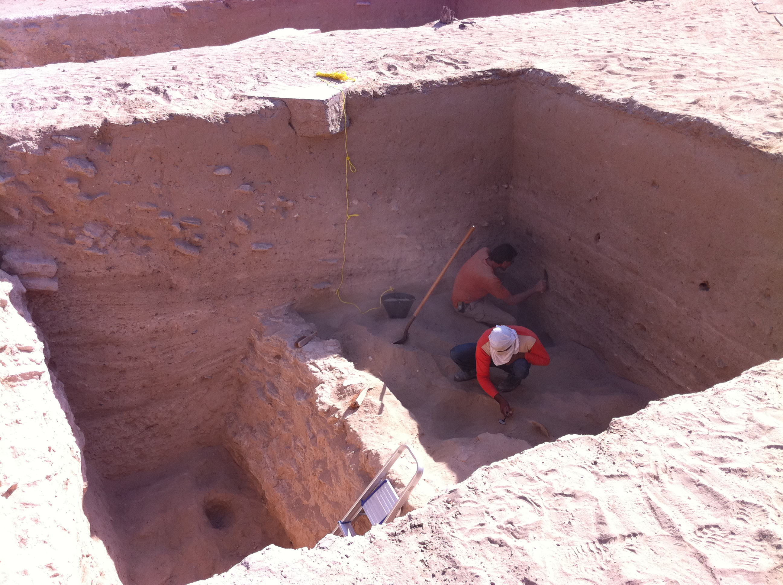 حفريات في تل ابرق